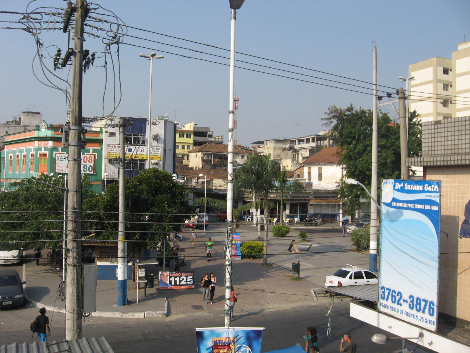 Vista do centro de Nilópolis, no estado do Rio de Janeiro.